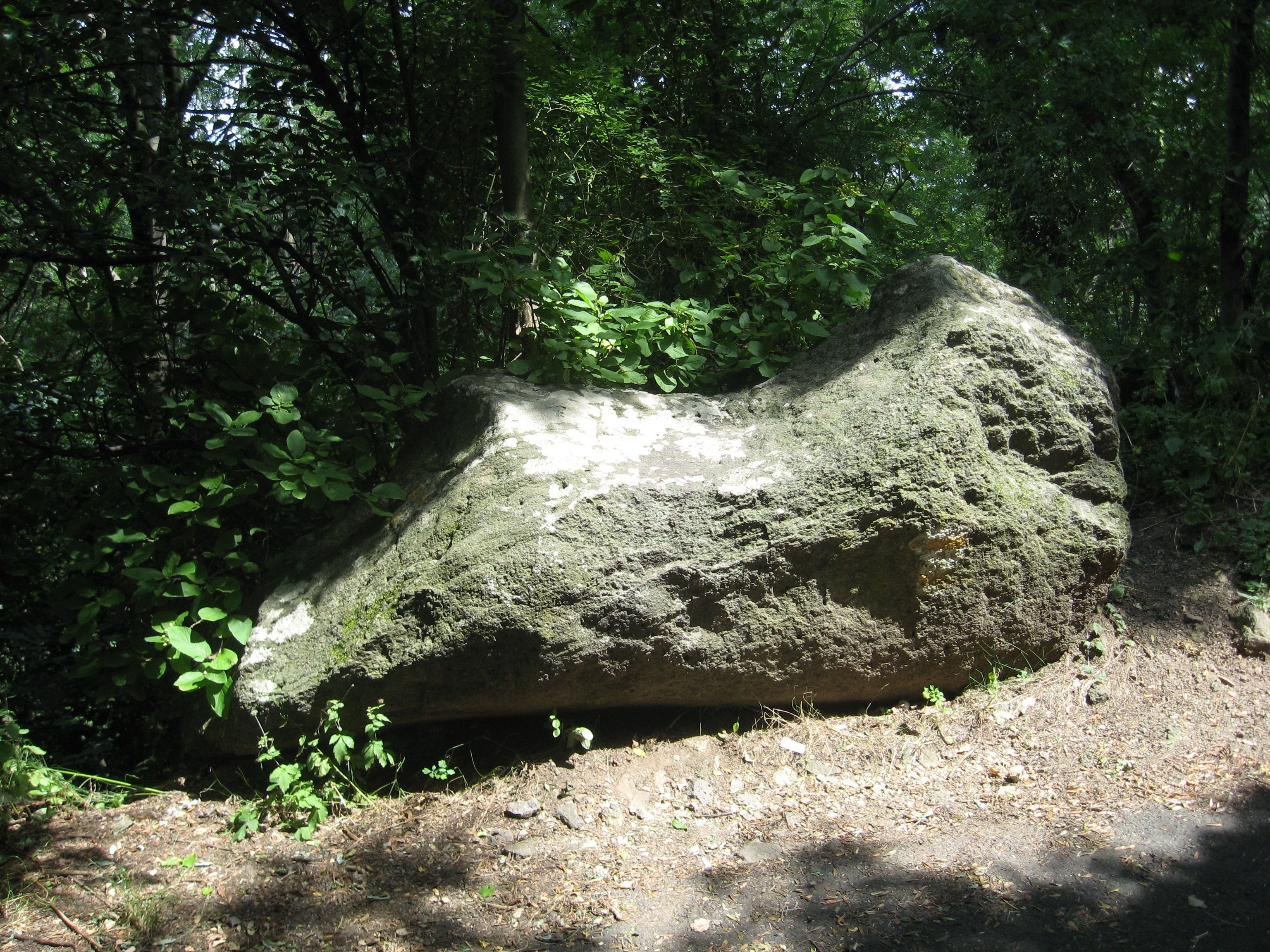 Kinizsi-szikla, Somló hegy, Veszprém megye